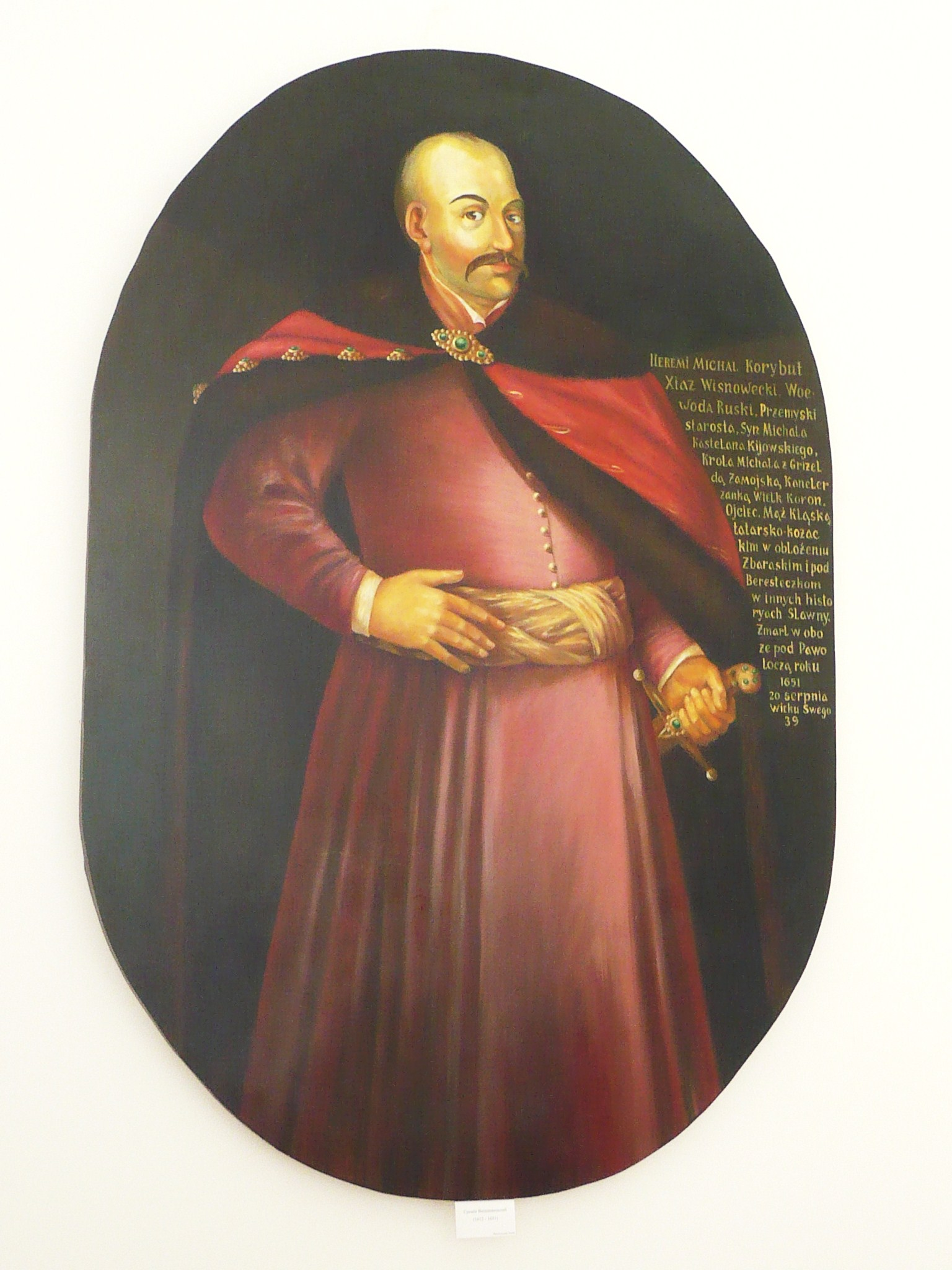 Wiśniowiec, obraz